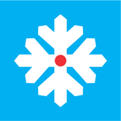 Allikas